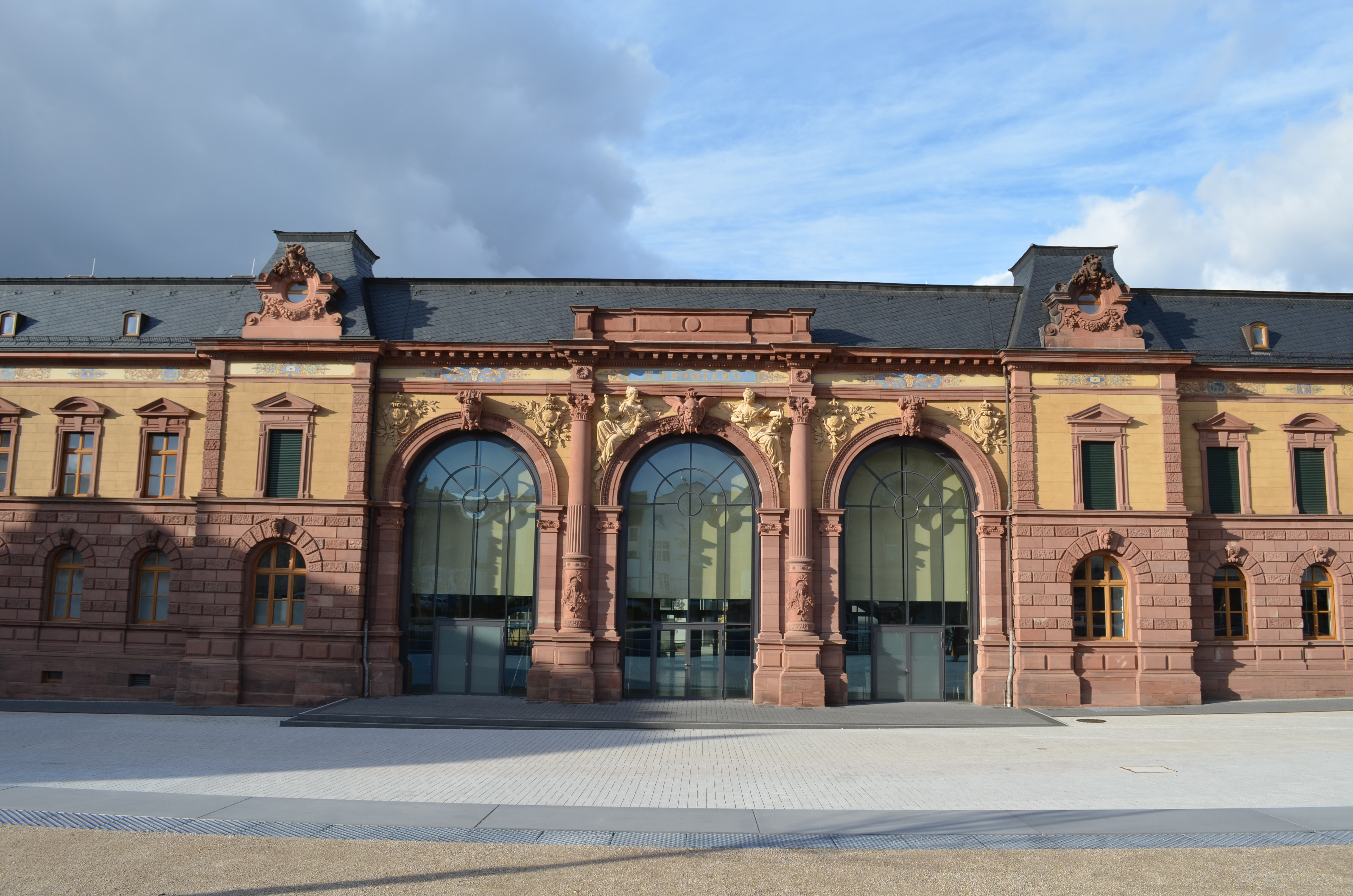 Poststraße 2 in Pirmasens: Ehemaliges Königlich-bayerisches Postamt; repräsentativer Neurenaissancebau, 1893; 2013 nach Umbau Nutzung als Forum Alte Post